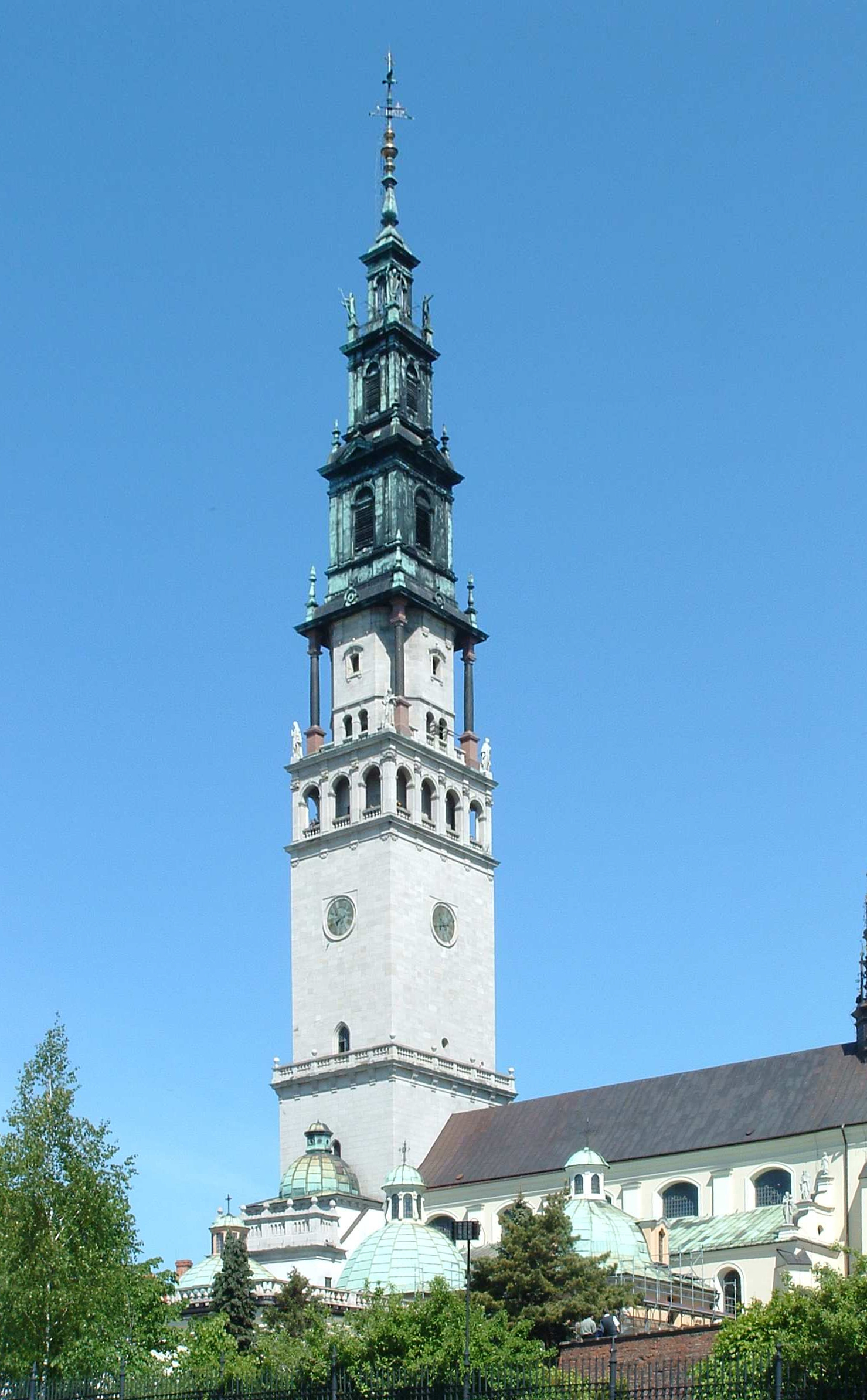 Klasztor na jansej Górze